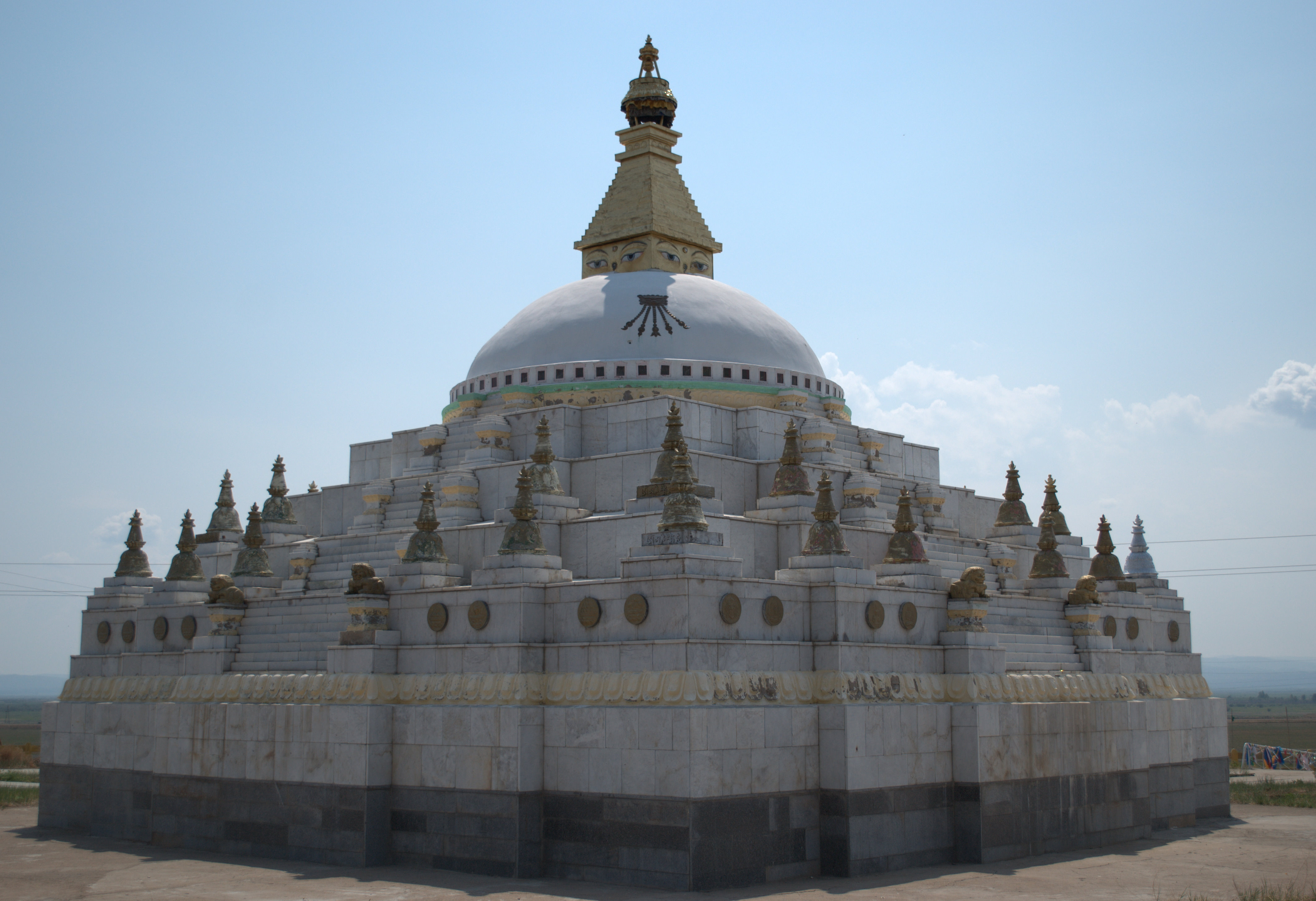 Джарун Хашор - самая большая ступа в Бурятии. Кижингинский район